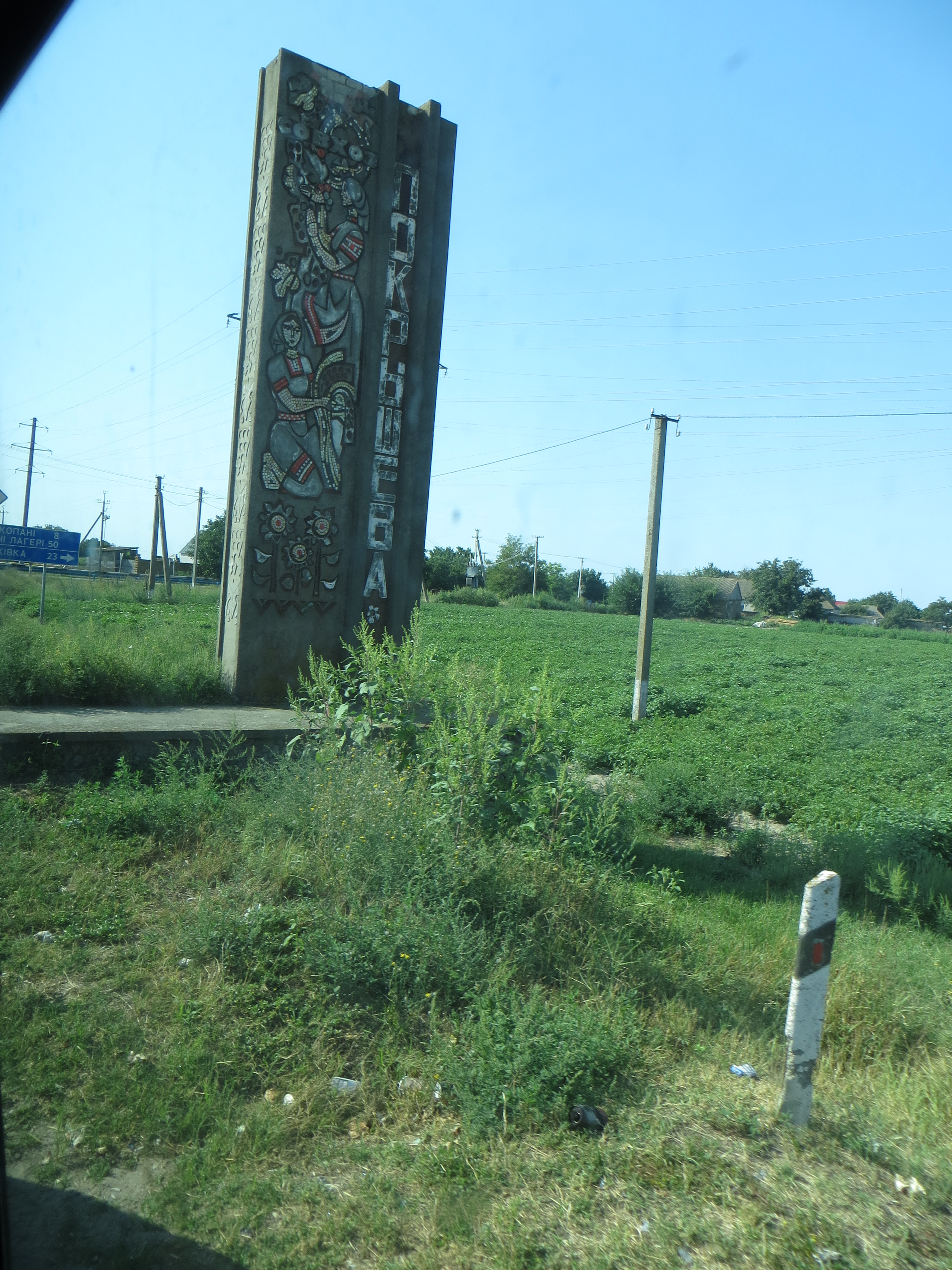 Радгосп ім. Покришева